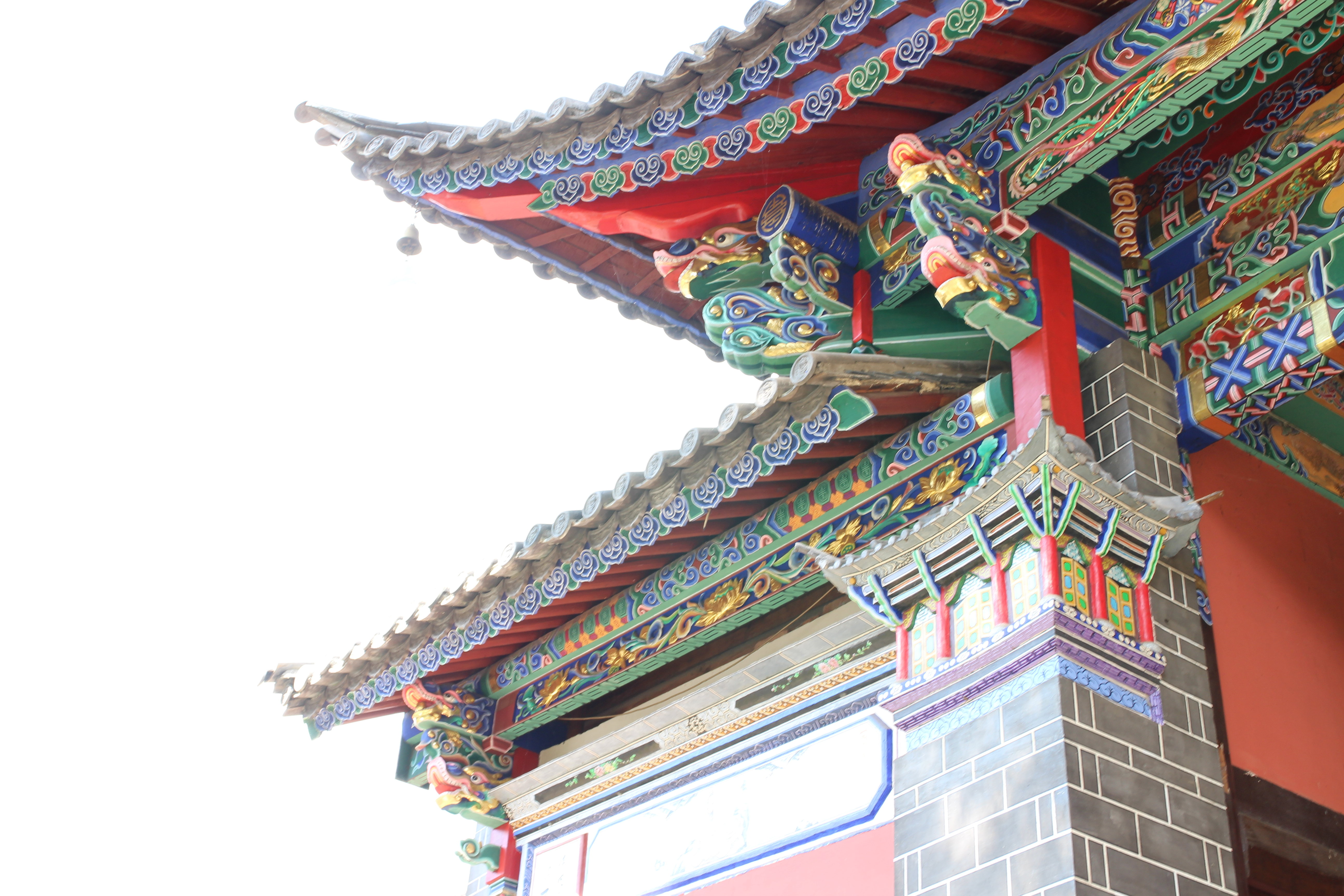 祝圣寺大殿飞檐